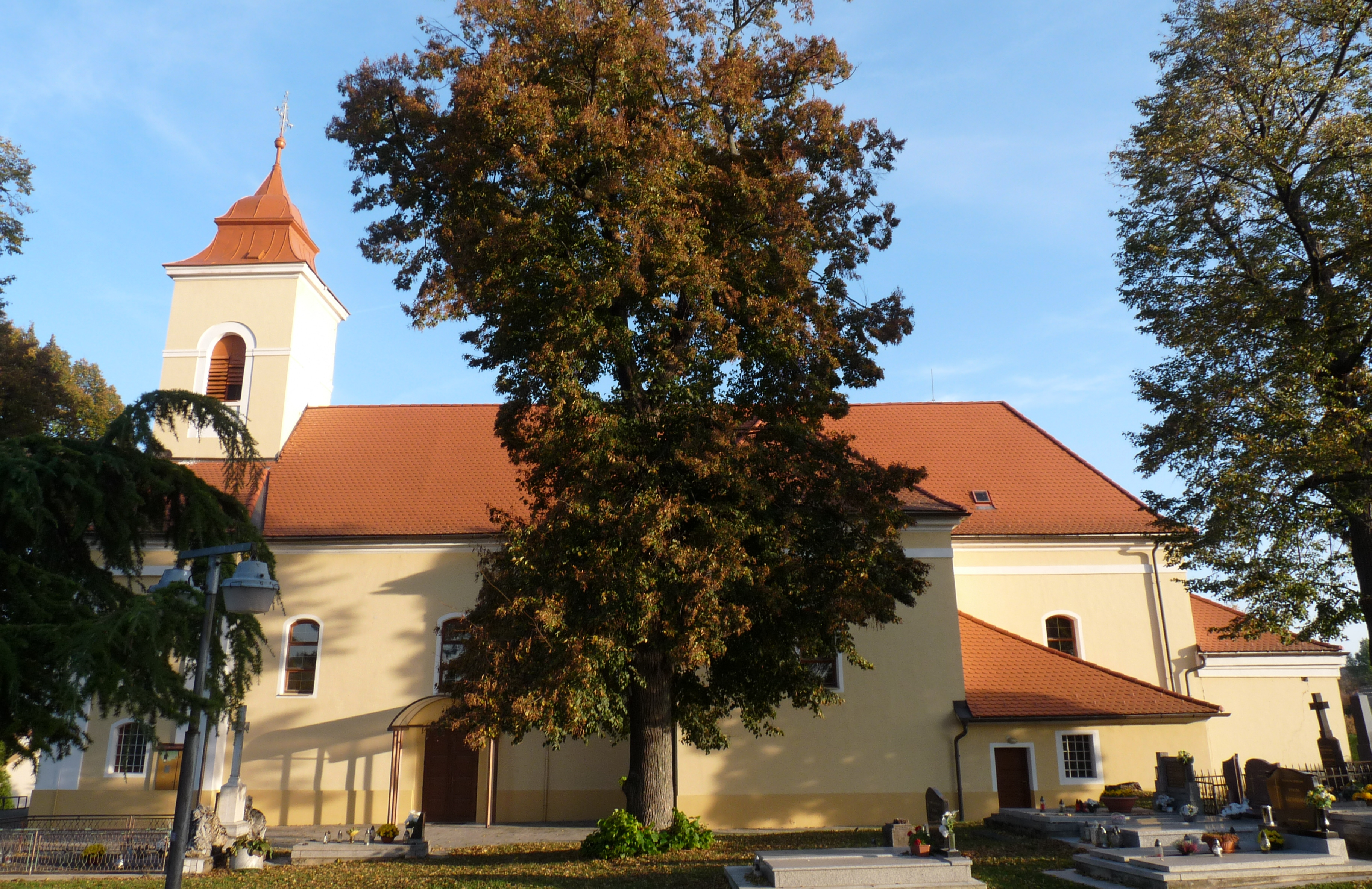 kostol sv. Jána Nepomuckého vo Veľkých Ripńanoch